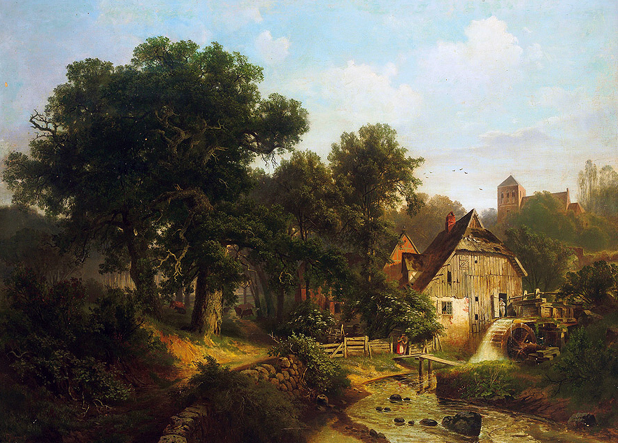 Gustav Pflugradt: Mühle; Öl auf Leinwand; 128 x 175 cm